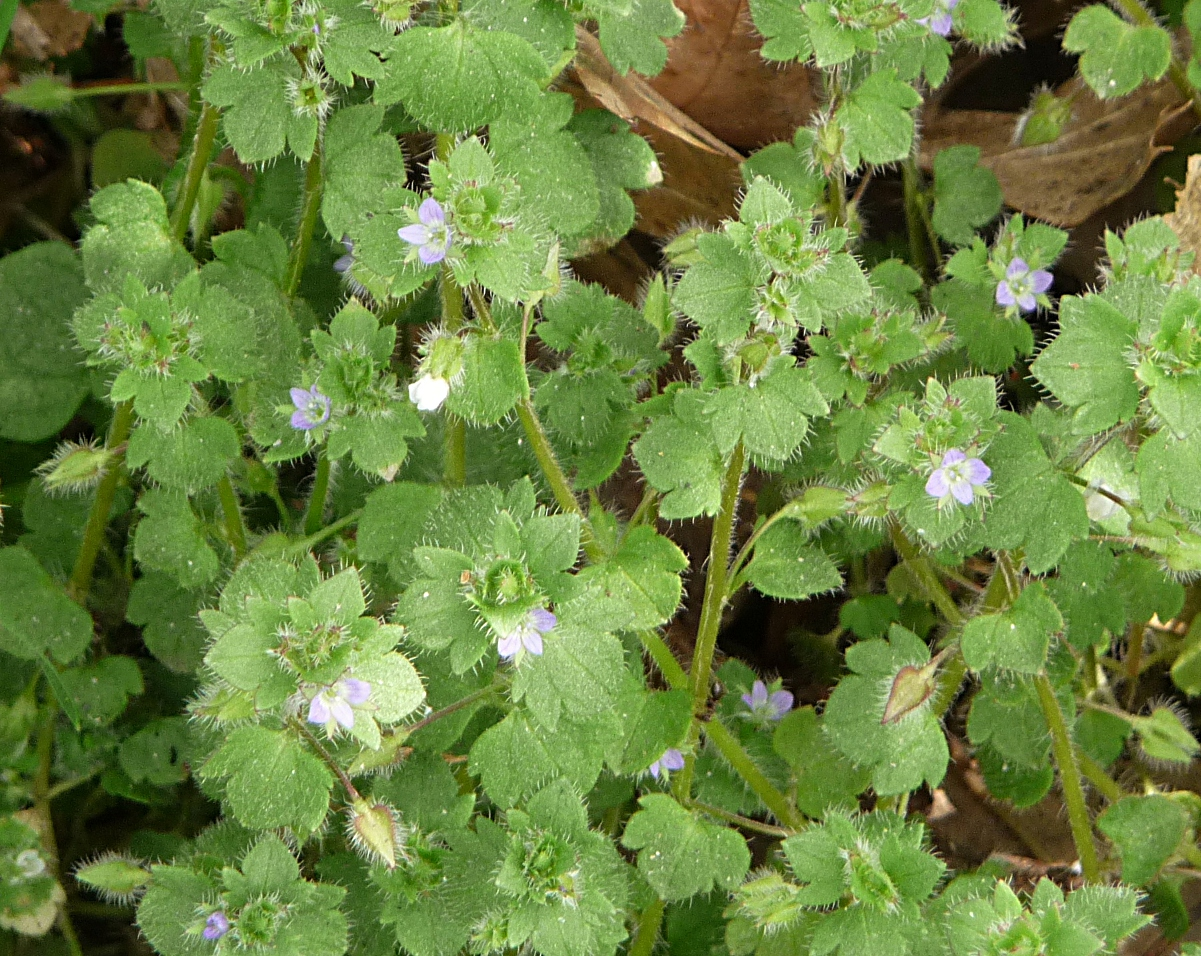 Efeu-Ehrenpreis an der Vornholzstraße in Passau